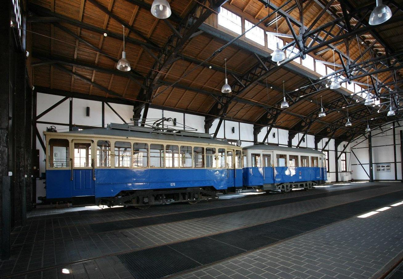 Wnętrze remizy tramwajowej. Została otwarta na moją prośbę:). Zaparkowane są tylko dwa wozy, bo pozostałe (jakie, nie wiem) wyjechały poprzedniego dnia, bowiem sala była wynajęta na wesele.